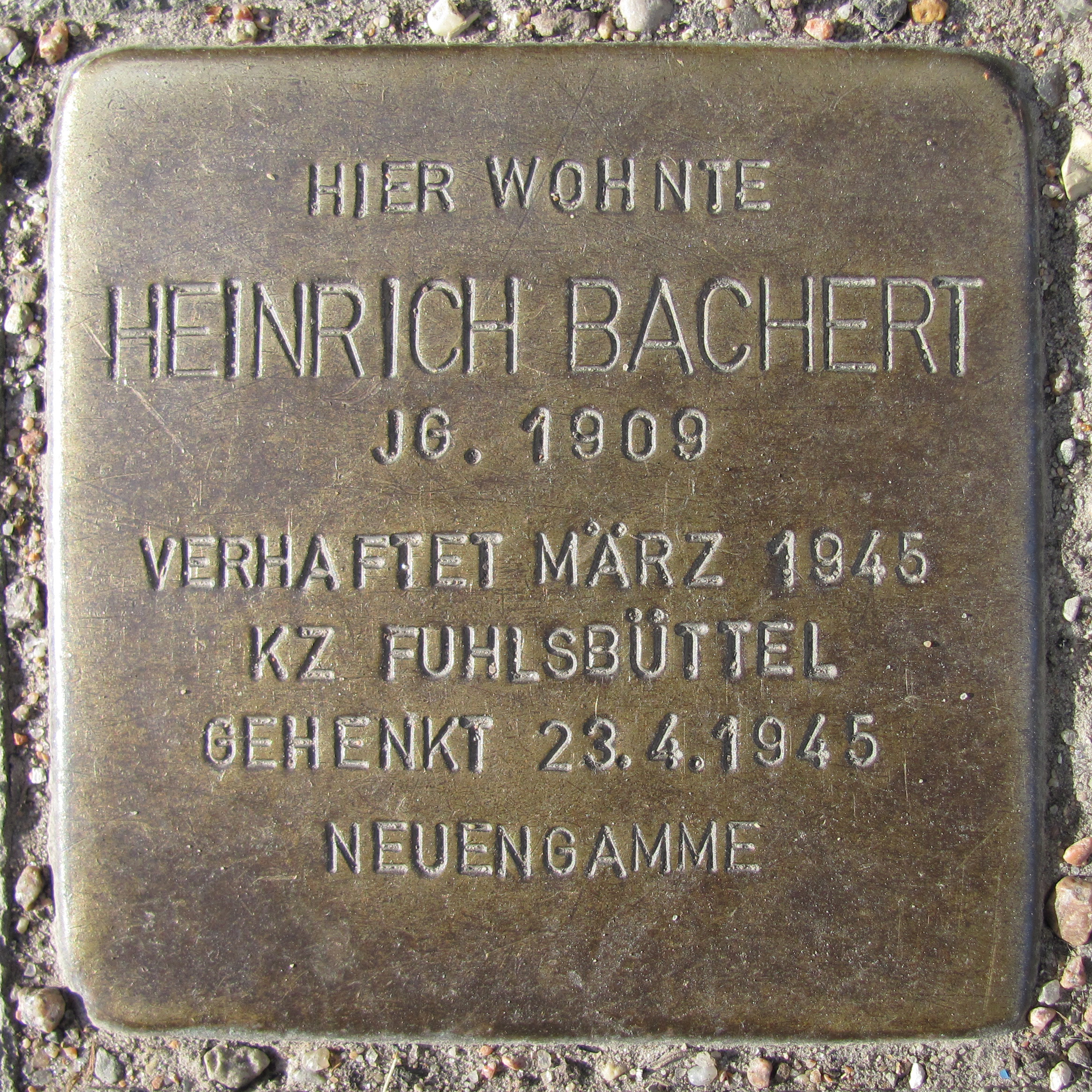 Stolperstein für Heinrich Bachert vor dem Haus Schenkendorfstraße 19